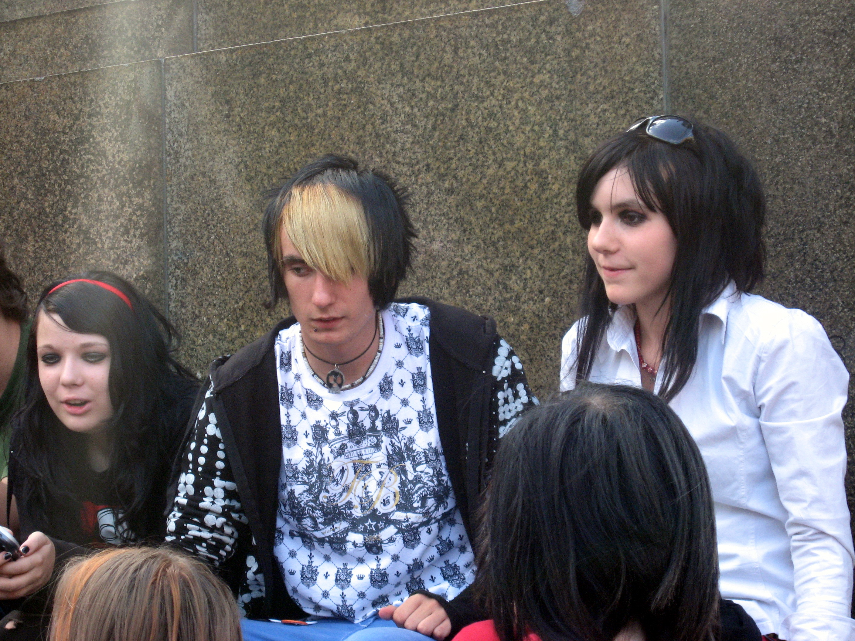 EMO na Václavském náměstí